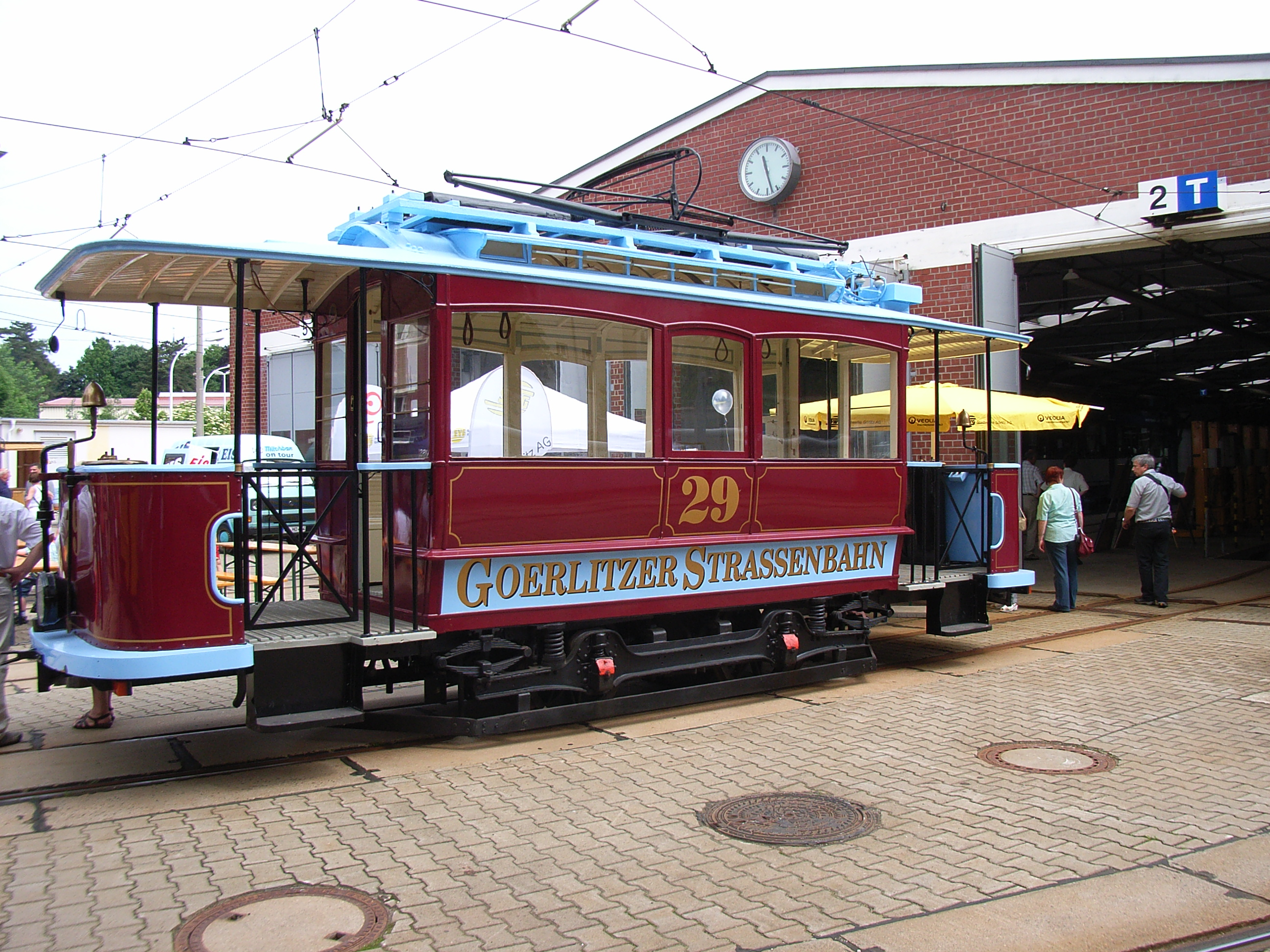 Historischer Wagen 29 der Görlitzer Straßenbahn